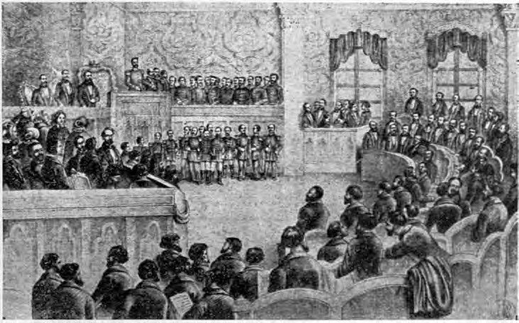 Deschiderea Camerei Naționale de către Alexandru Ioan Cuza, 29 Februarie 1860